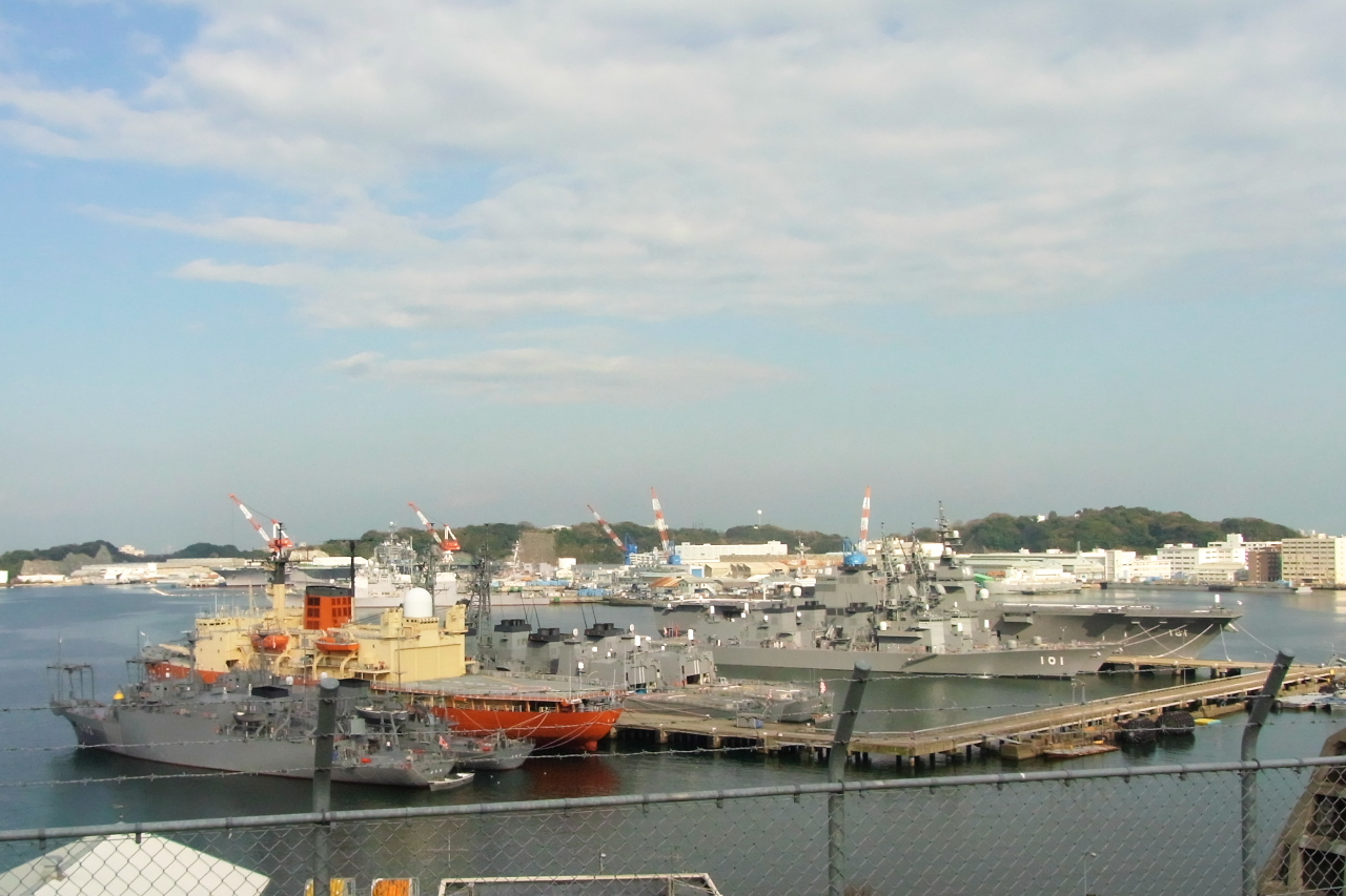 海上自衛隊横須賀基地の吉倉桟橋です。背後には空母ジョージ・ワシントンも見えます。